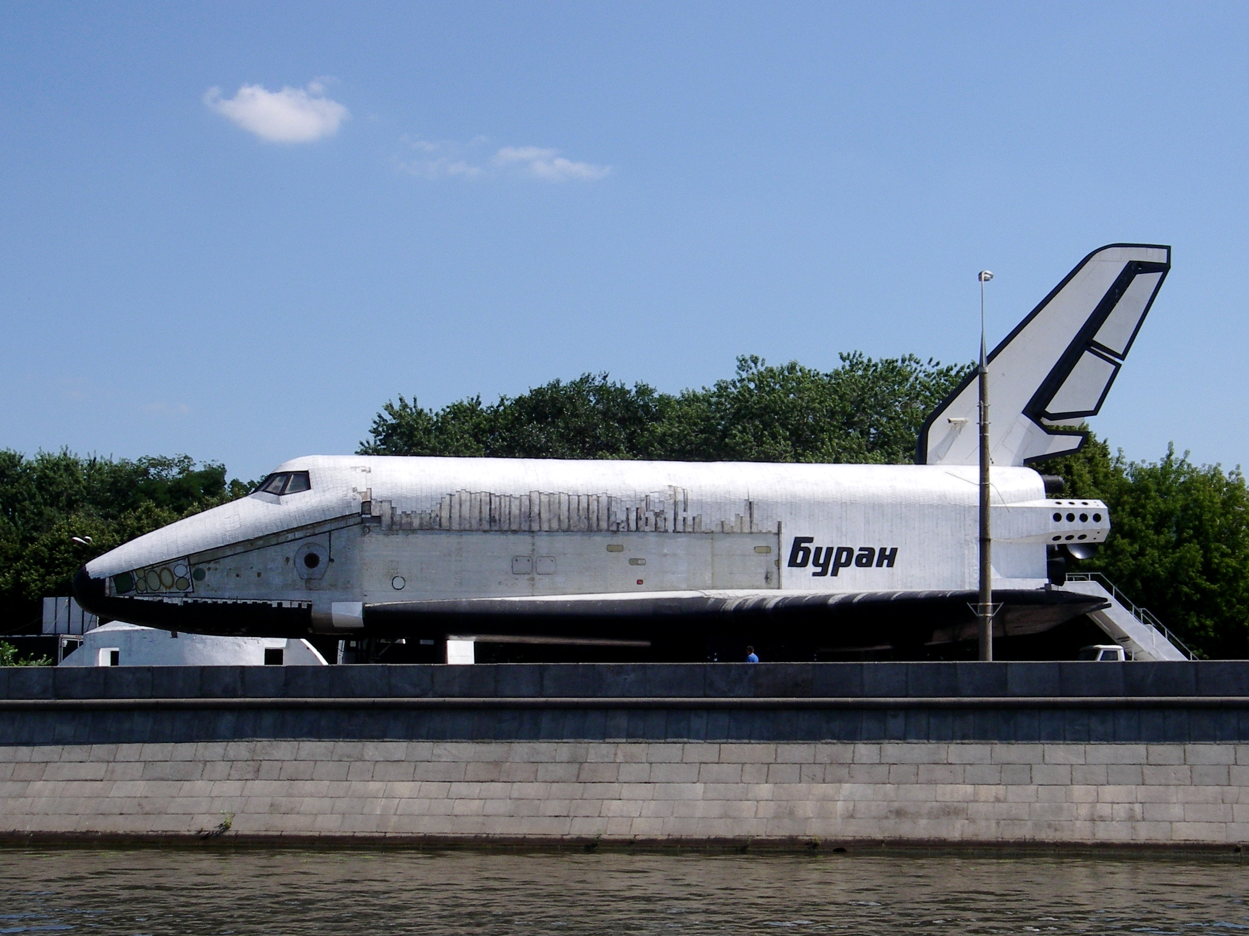 Buran in Gorky Park